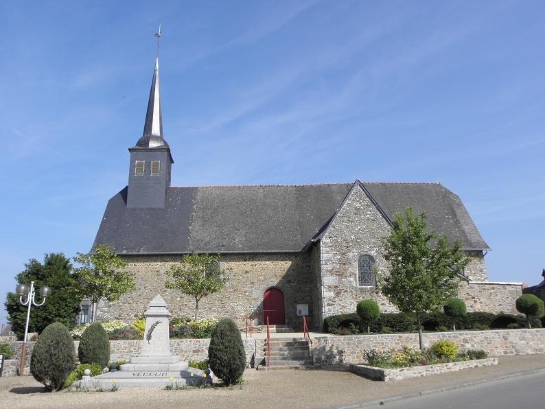 Église Saint-Martin-de-Tours de Feins (35).